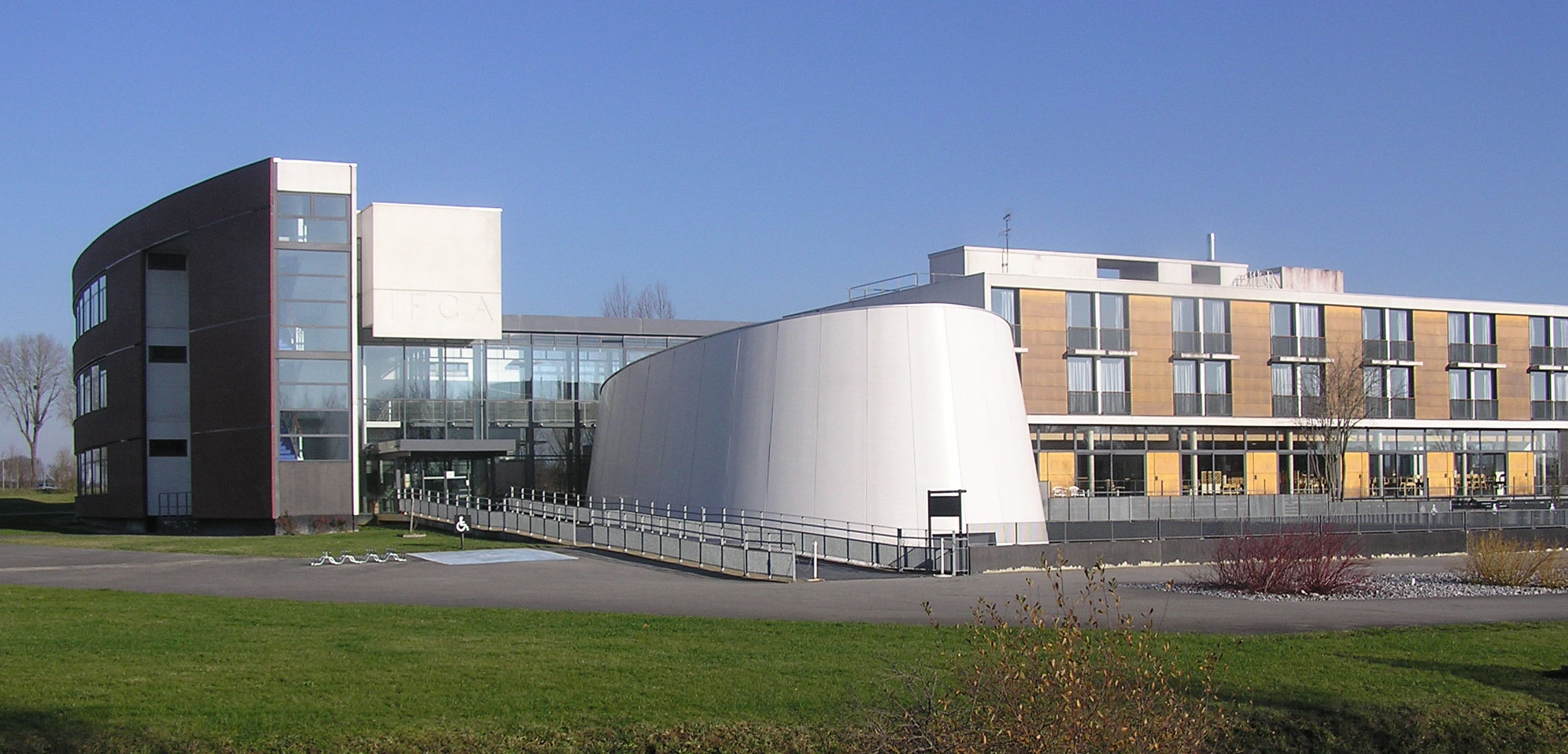 Institut de Formation des Chambres d'Agricultures